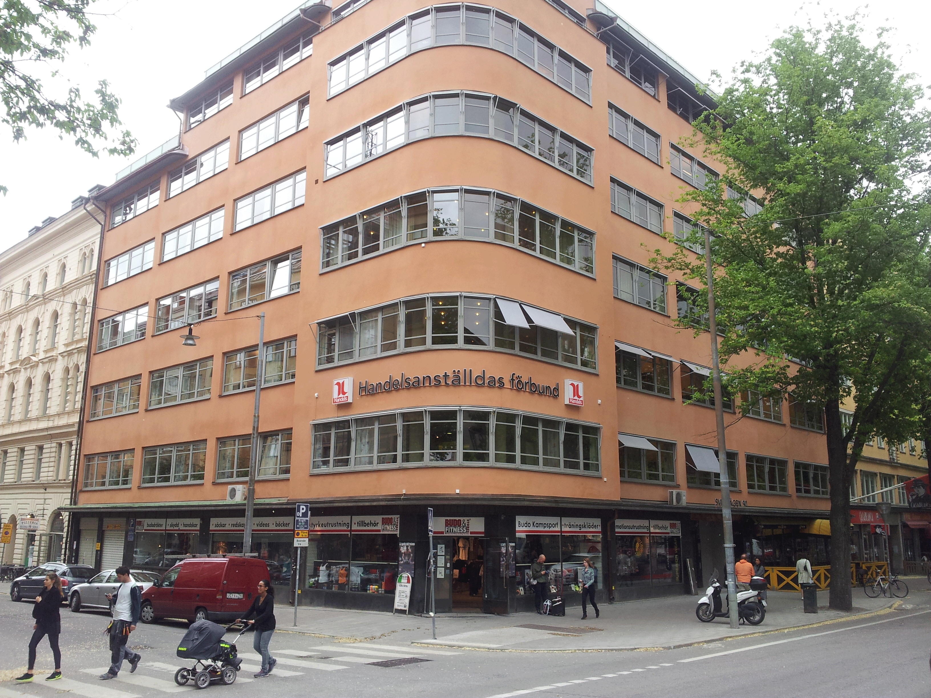 Handelsanställdas förbund, förbundskontor, Sveavägen 90, Stockholm